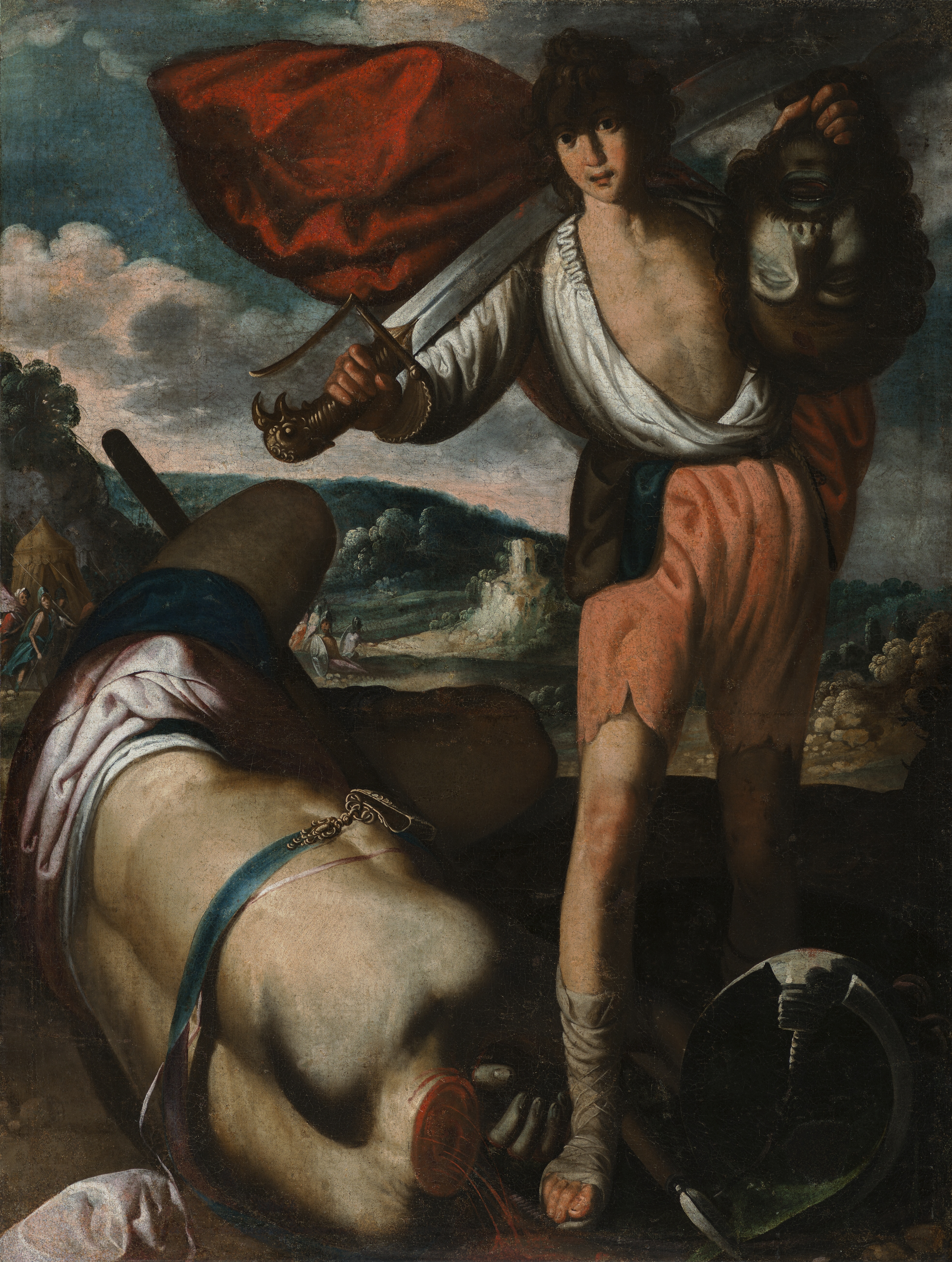 La obra representa al futuro rey David mostrando la cabeza cercenada del gigante filisteo Goliat, a quien había dado muerte.